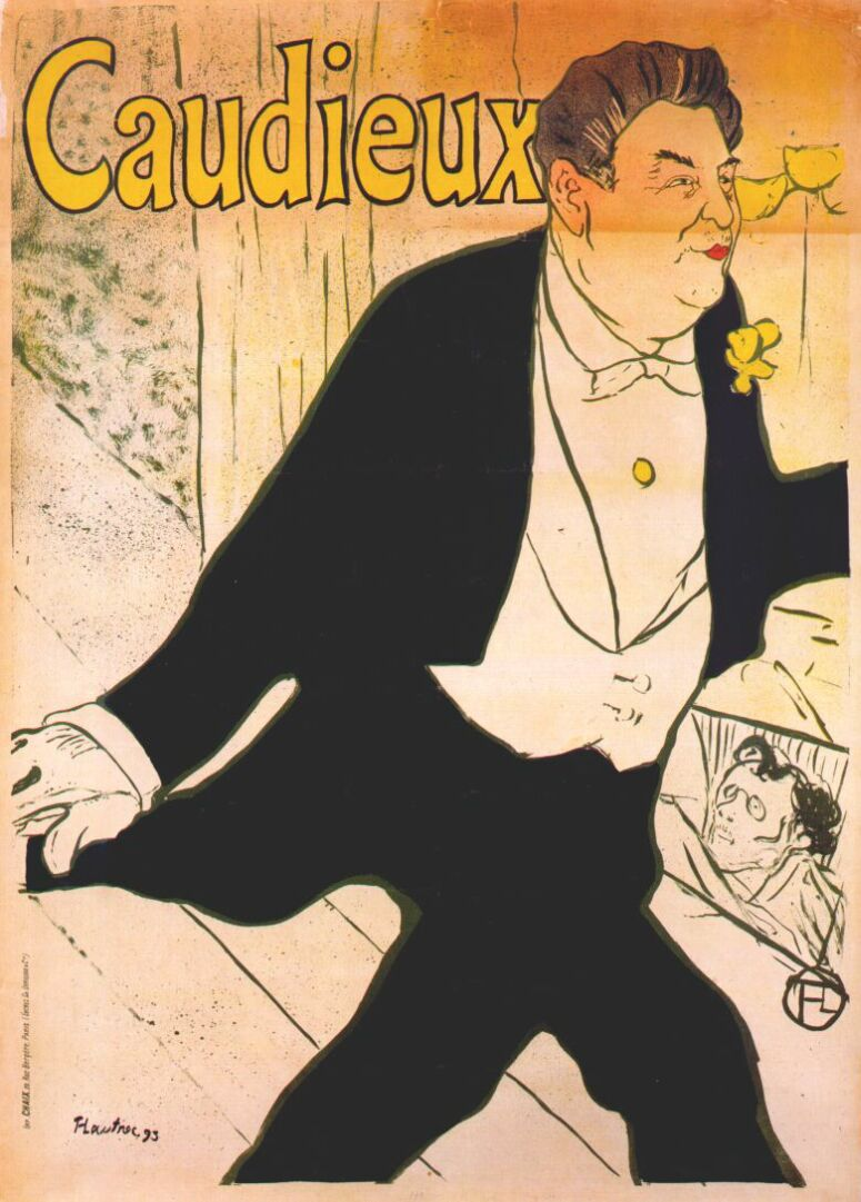 Henri Toulouse-Lautrec (1864-1901): caudieux_(poster)_1893